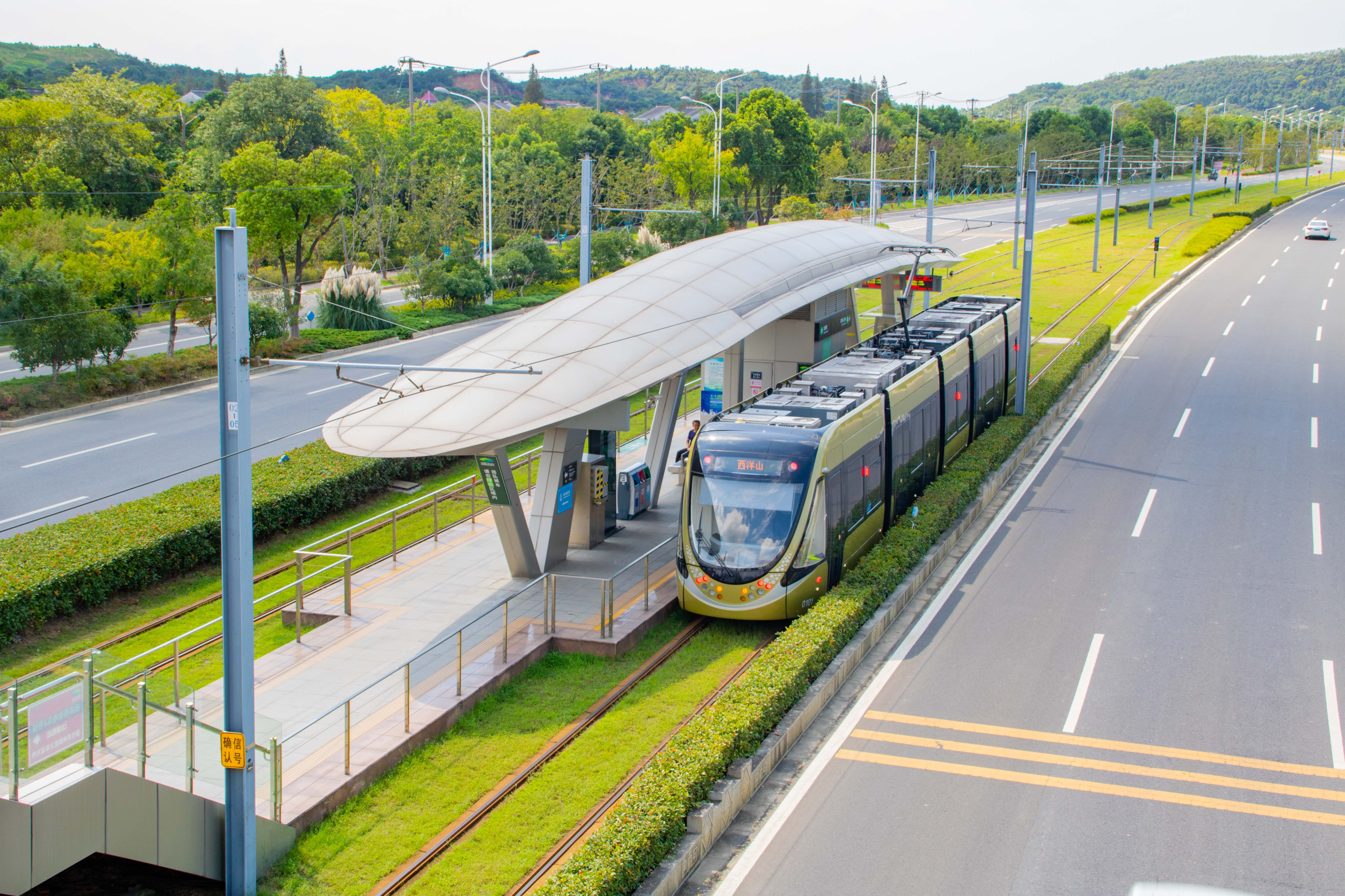 龙康路站有轨电车1号线部分站台